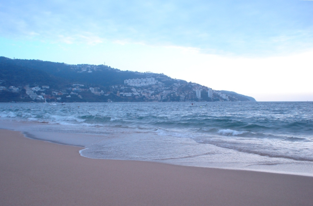 Playa Icacos en Acapulco, Guerrero, México.